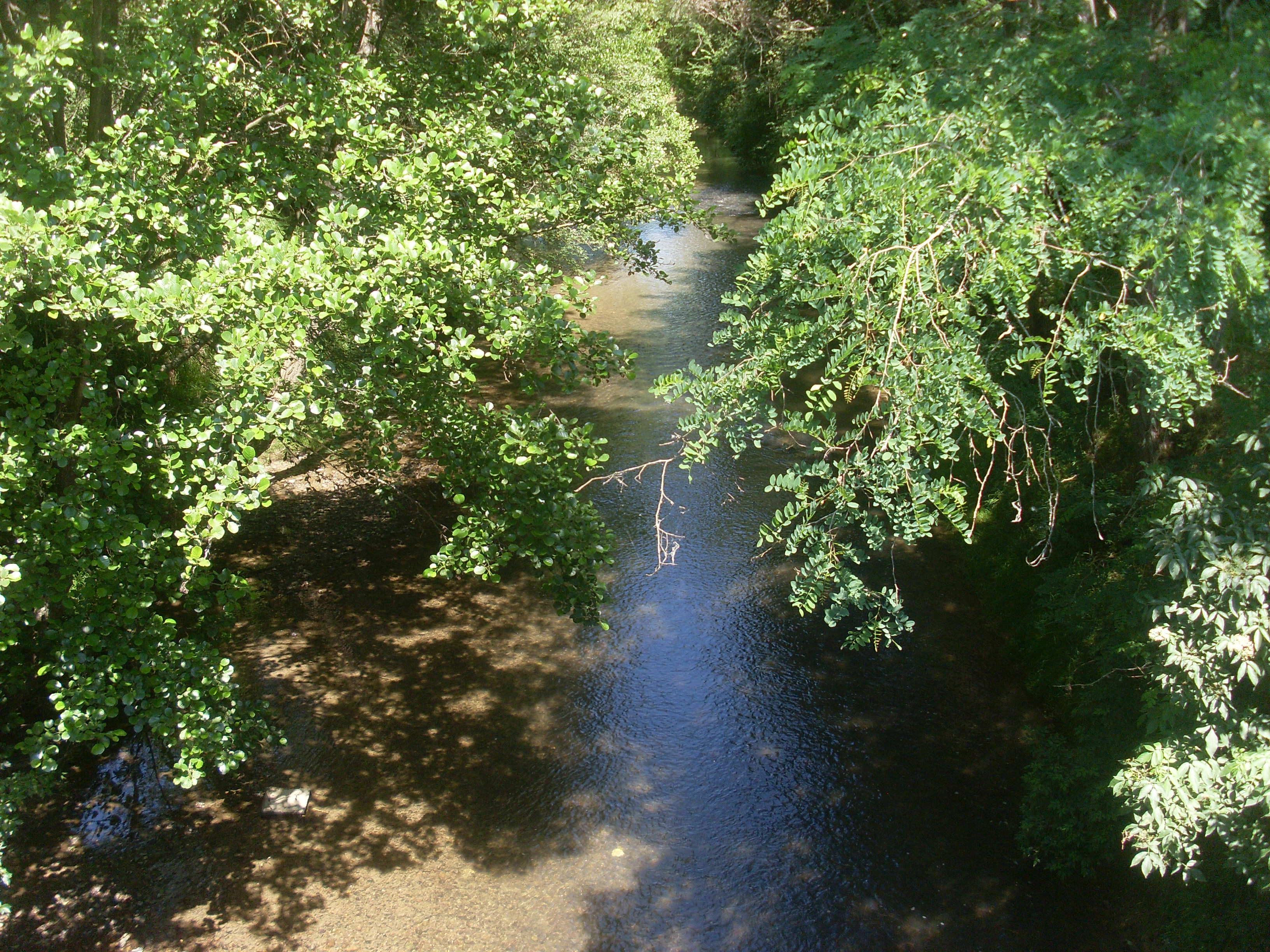 La Louge à Saint-Elix-le-Château